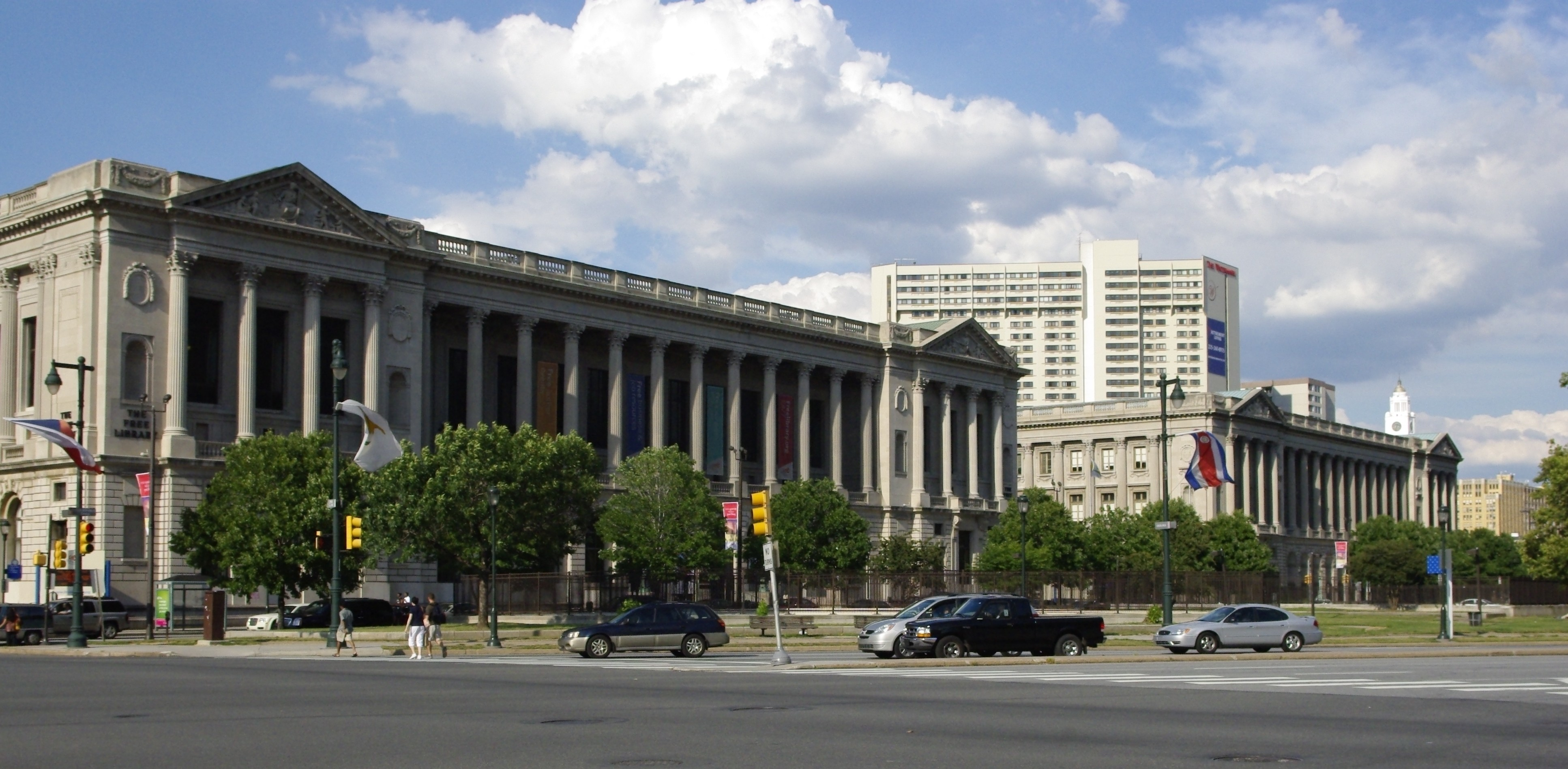 Logan Square, Philadelphie